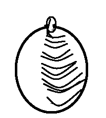 Tubo enrrollado